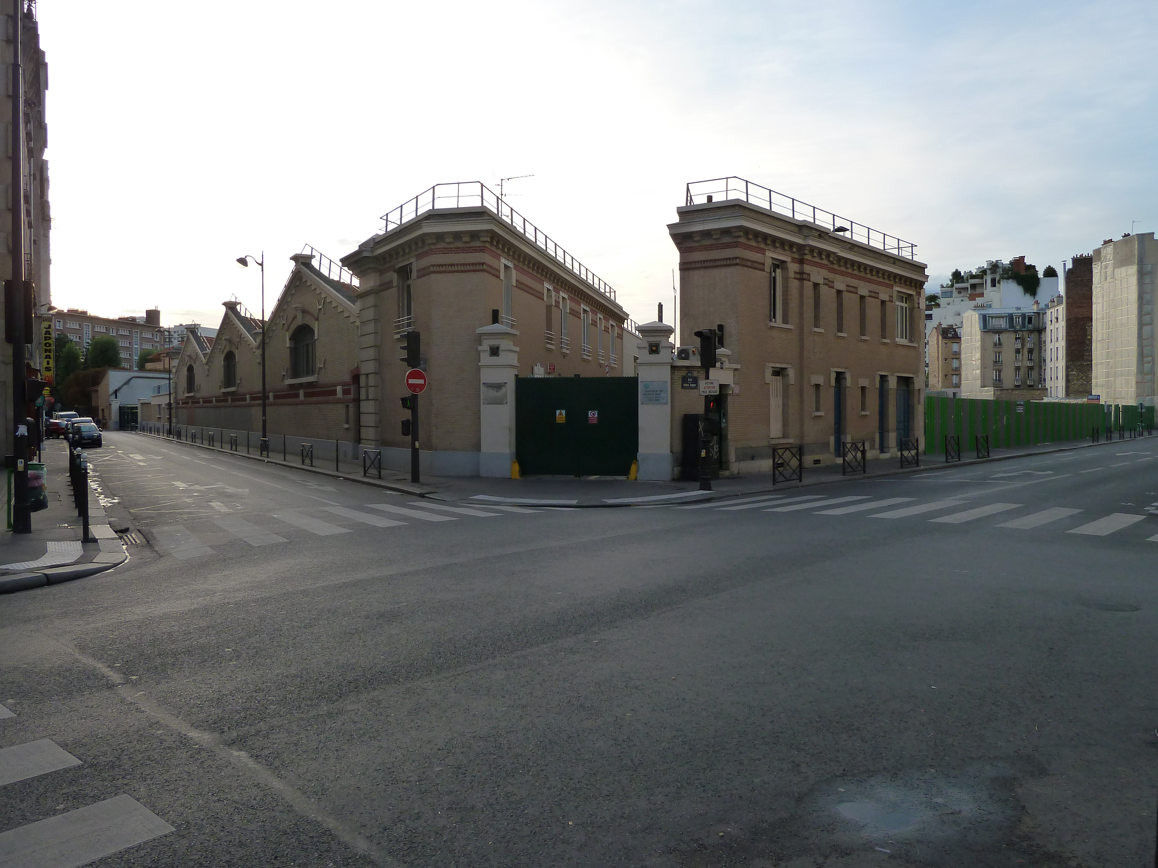 Entrée de l'atelier de Vaugirard, angle des rues Desmouettes et de la Croix-Nivert, XVe arrondissement, Paris, France.